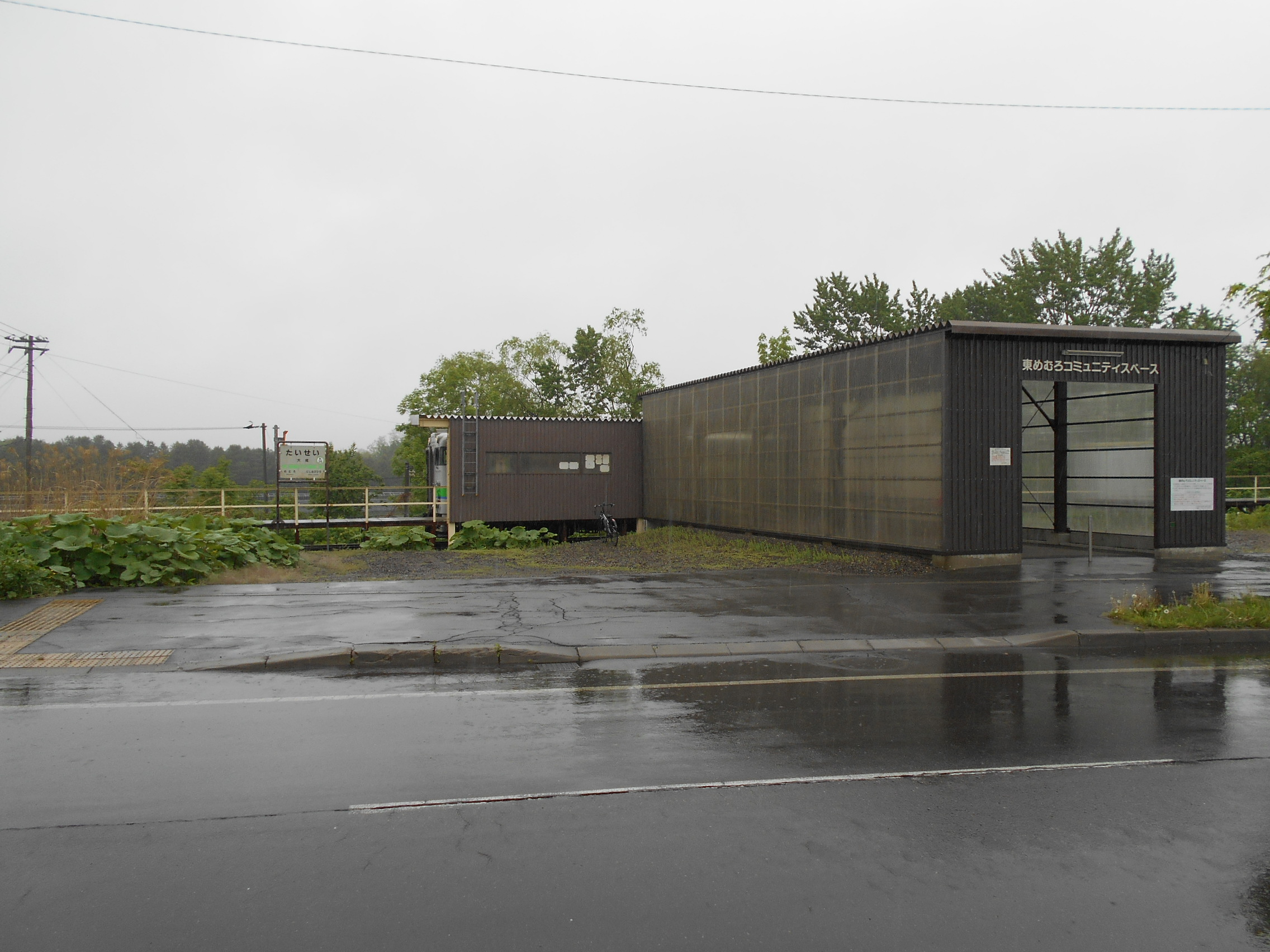 JR北海道 大成駅